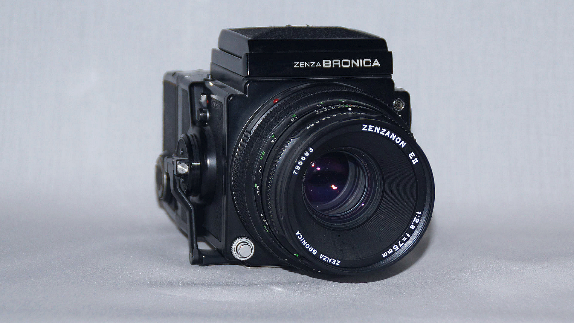 Zenza Bronica Tokyo mit Zenzanon EII 1:2.8/75mm, Foto Wolfgang Pehlemann DSC04832